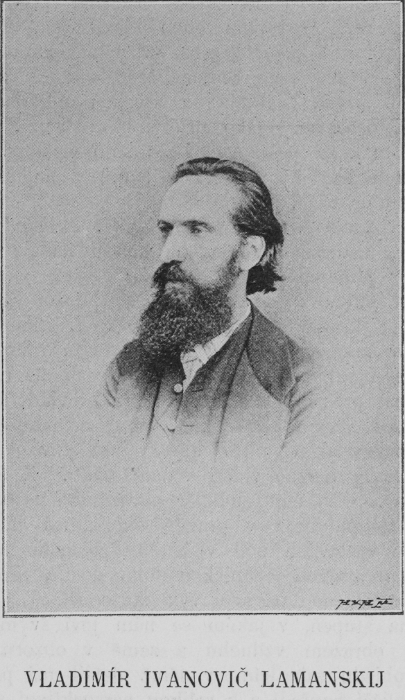 Portrait of Vladimir Ivanovich Lamanski (Russian: Владимир Иванович Ламанский 1833 - 1914), Russian historian.